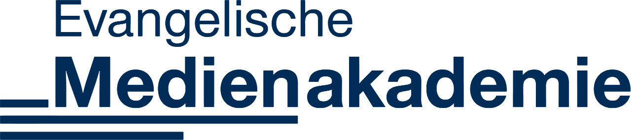 Offizielles Logo der Evangelischen Medienakademie mit Sitz in Hamburg.